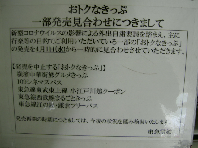 新型コロナウイルスによる外出自粛要請に伴う旅客流動減少をうけての東急電鉄の切符取り扱い告知